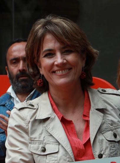 En el acto ha intervenido el secretario regional, Guillermo Fernández Vara, la ministra de Justicia del Gobierno de España, Dolores Delgado, el secretario general de la provincia de Cáceres, Miguel Ángel Morales, la candidata número uno al Congreso de los Diputados por la provincia de Cáceres, Belén Fernández.